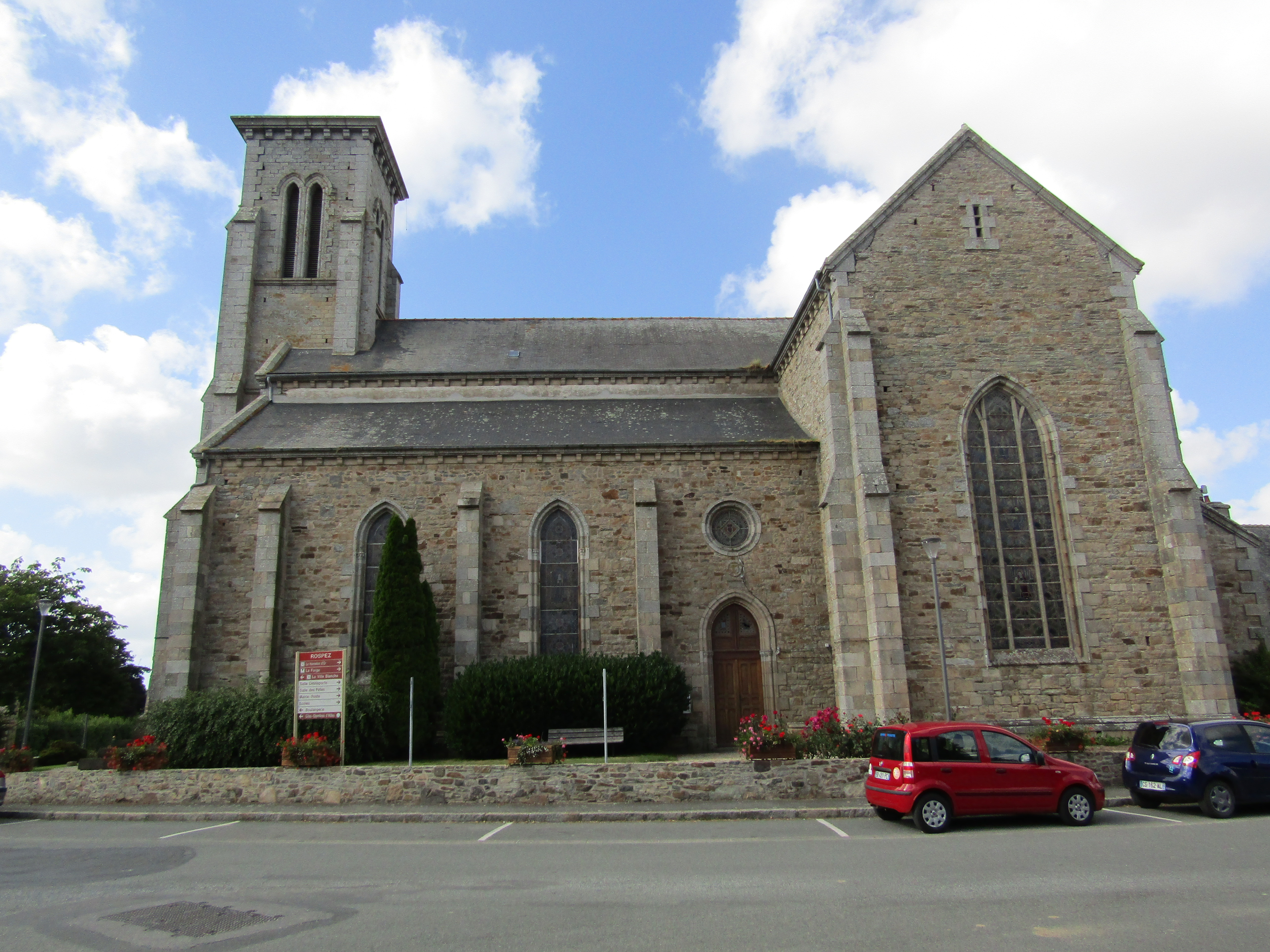 L'Église Saint-Pierre et Saint-Paul de Rospez